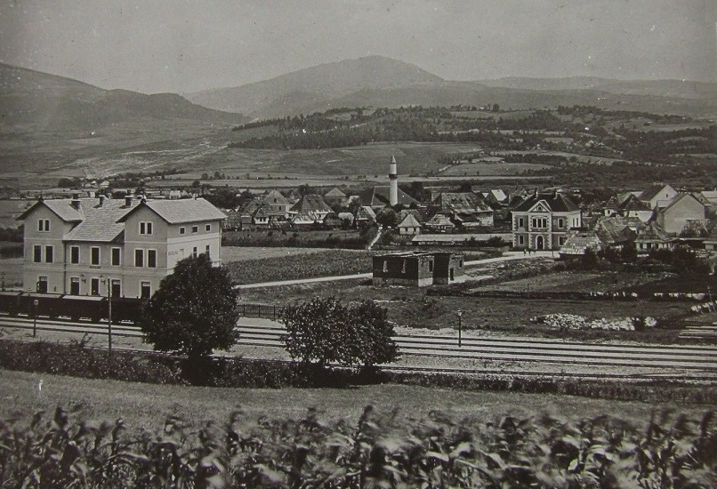 Bahnstation Bugojno